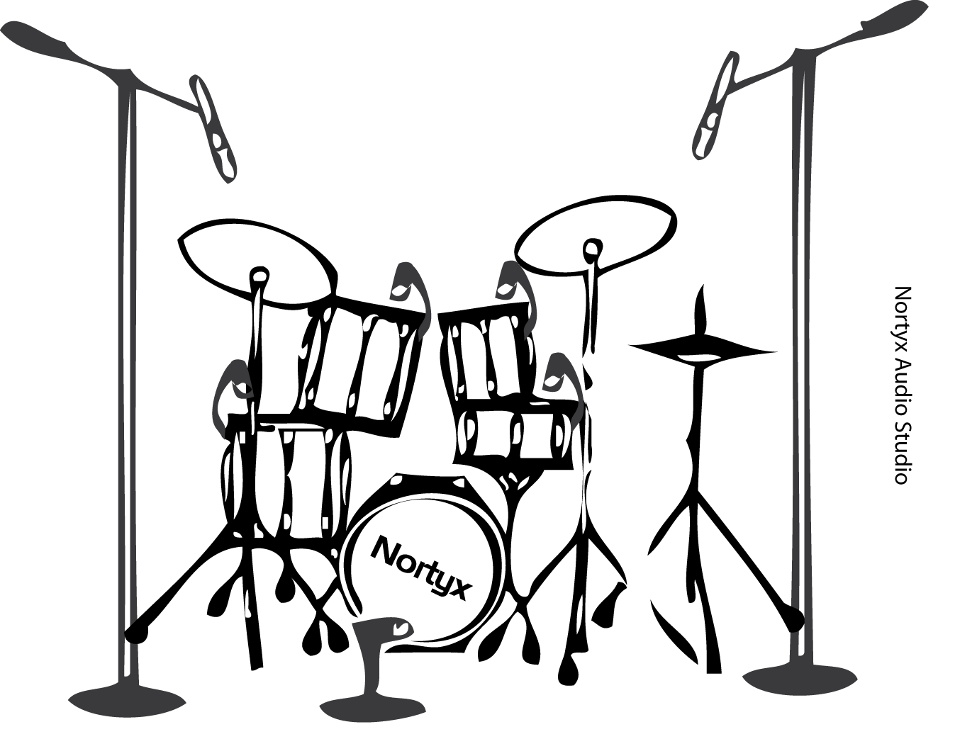 Dobok mikrofonozása